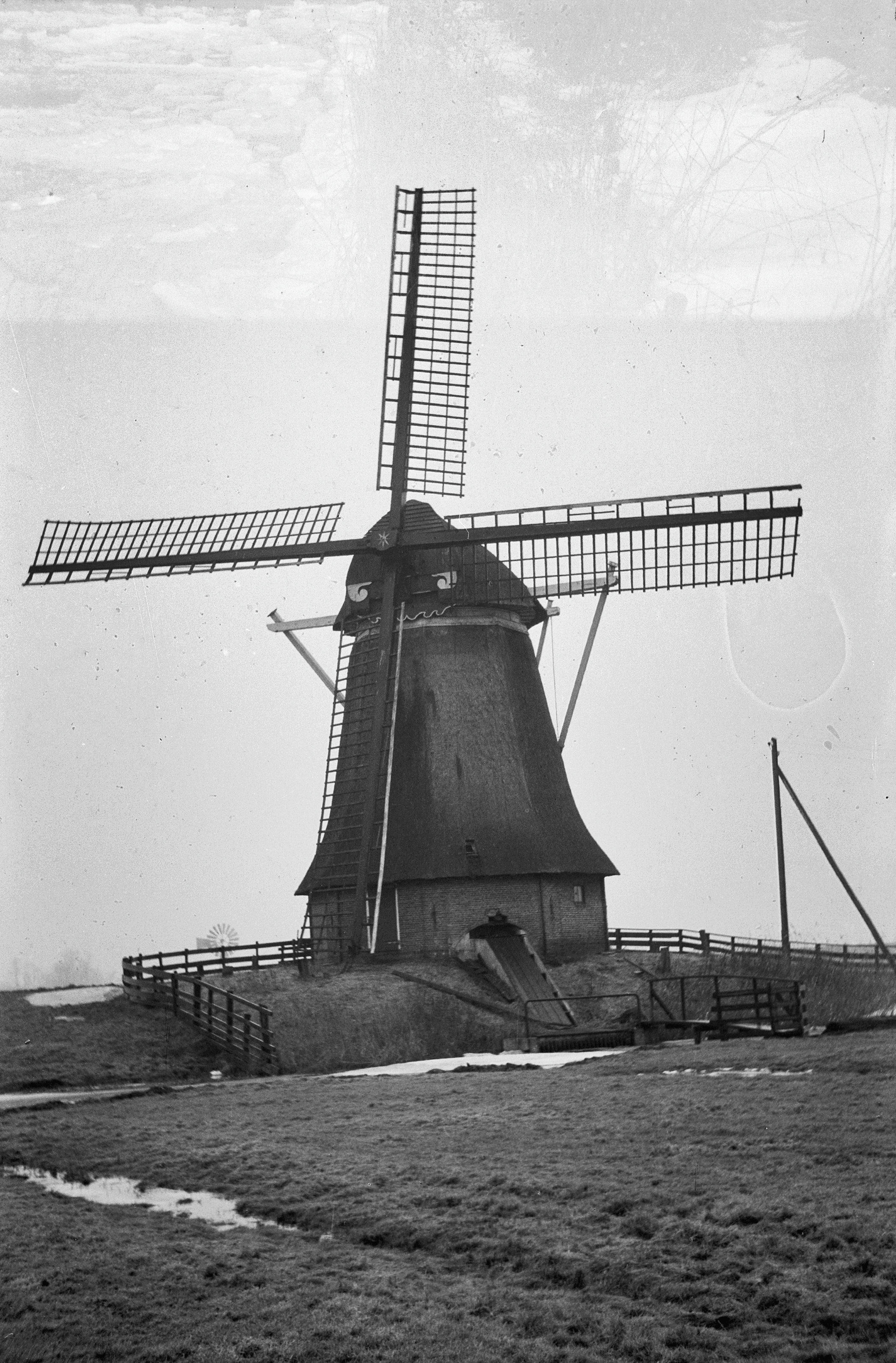 Diversen: Watermolen van de Hempensermeerpolder